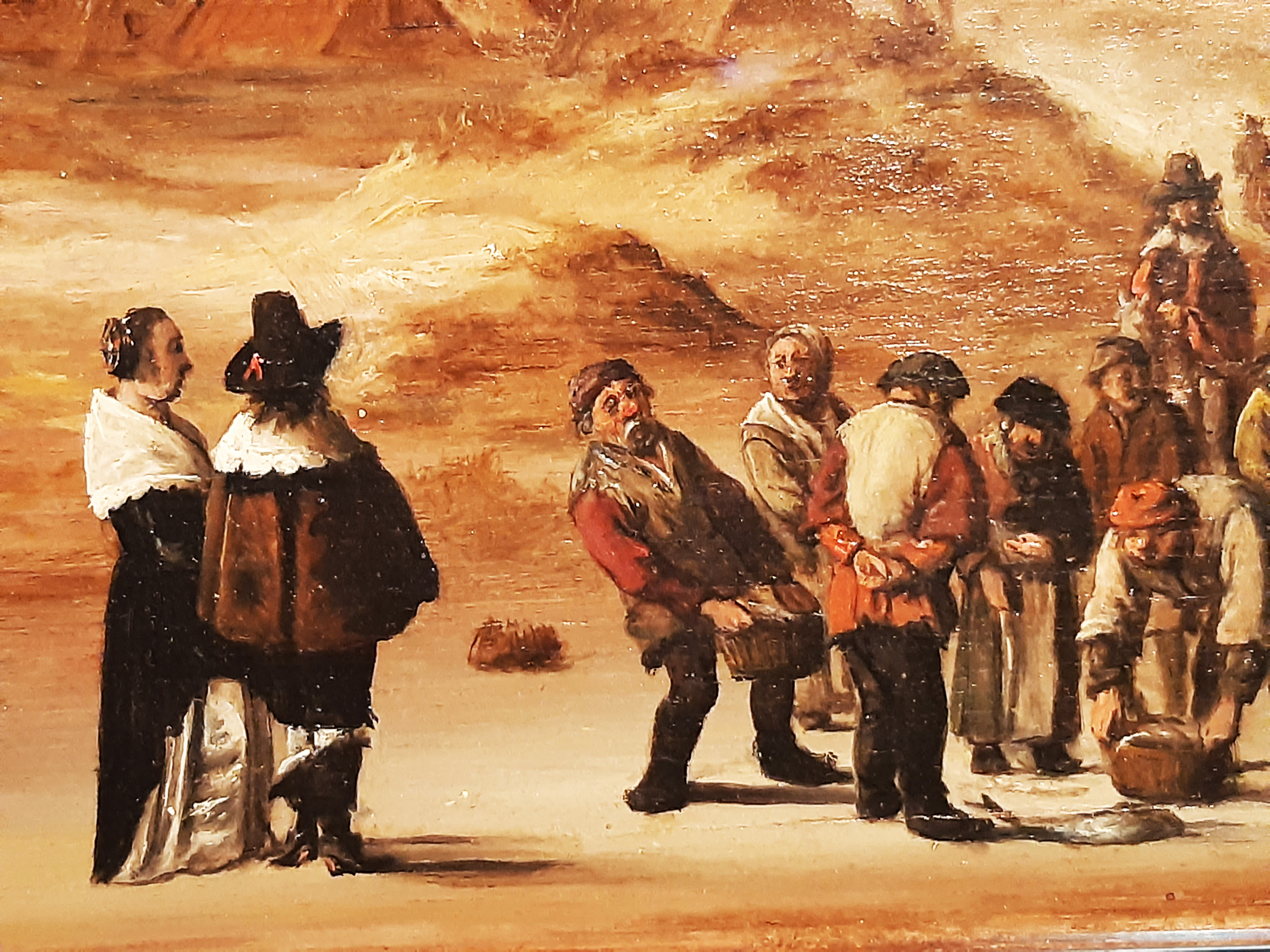 Рибалки. Фрагмент картини "Морське узбережжя поблизу Егмонда-аан-Зее"